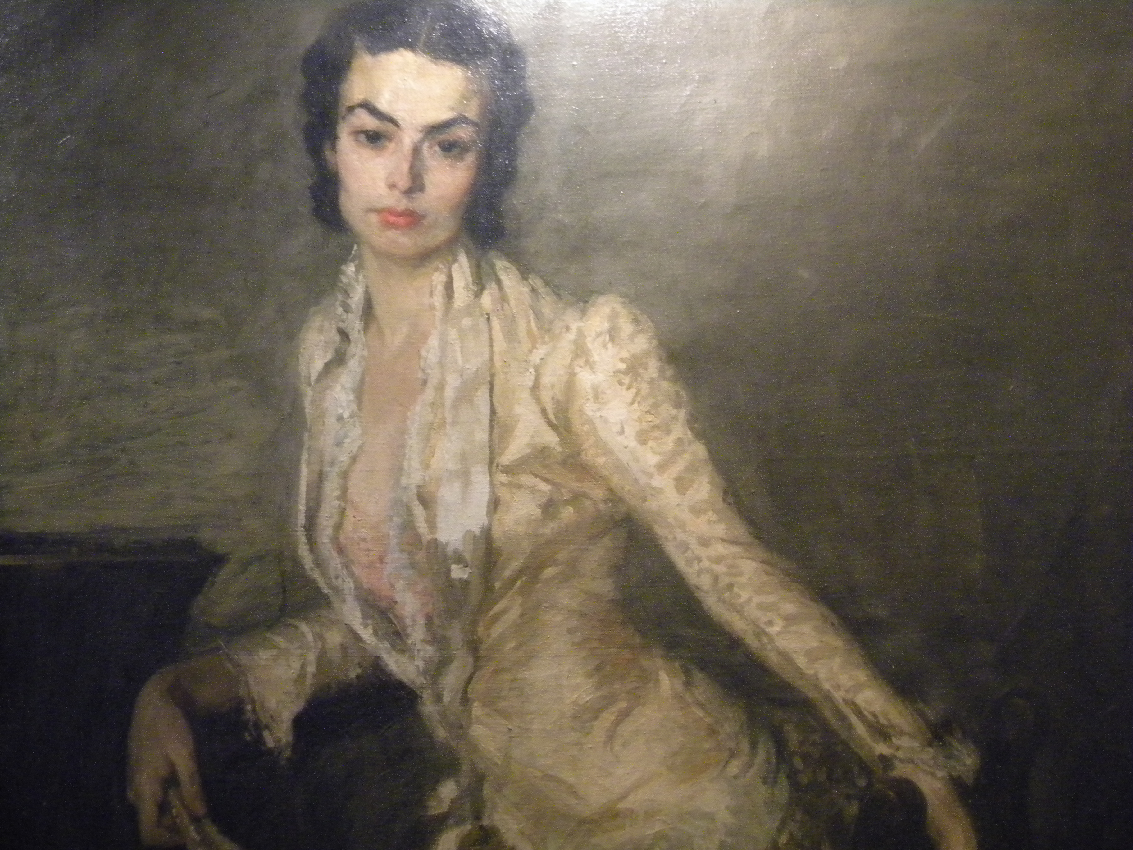 Bucuresti, Romania, Palatul Sutu, (portretul Henriettei Cihoschi Veron (fiica Generalului Henri Cihoschi), pictat de Constantin Isachie si expus la Palatul Sutu -B-II-m-A-18221)